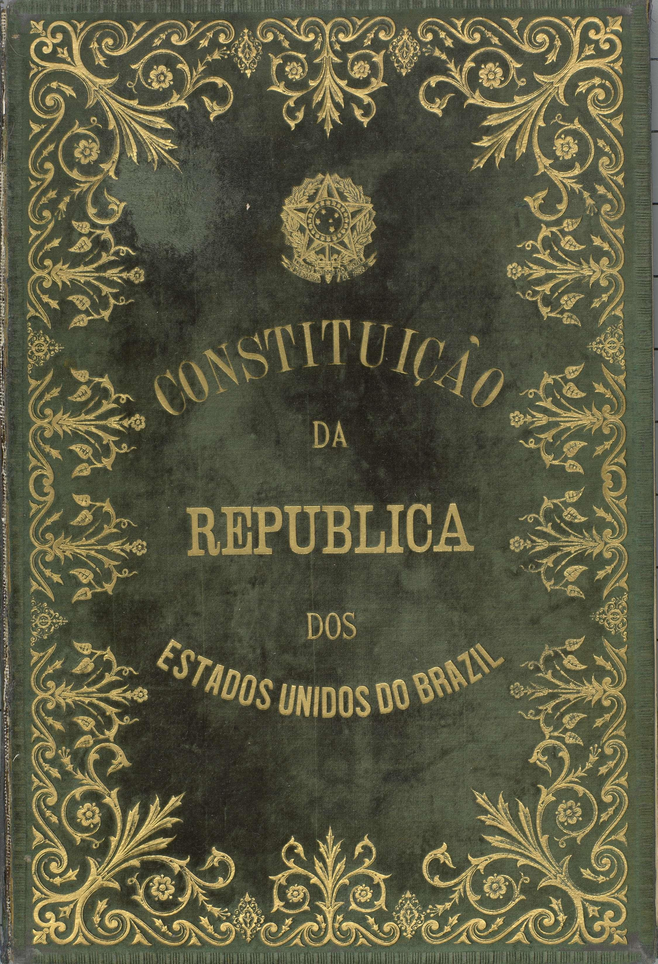 Capa da Constituição da República do Brasil, de 1891.